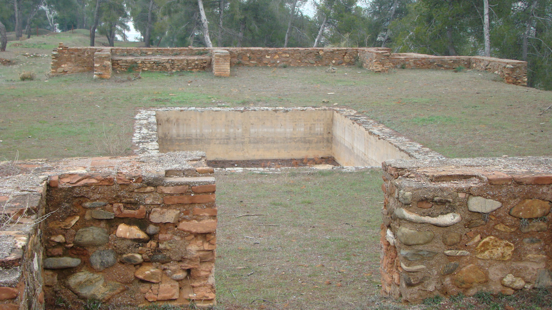 Ruinas del palacio de Dar al-Arusa, en la Alhambra